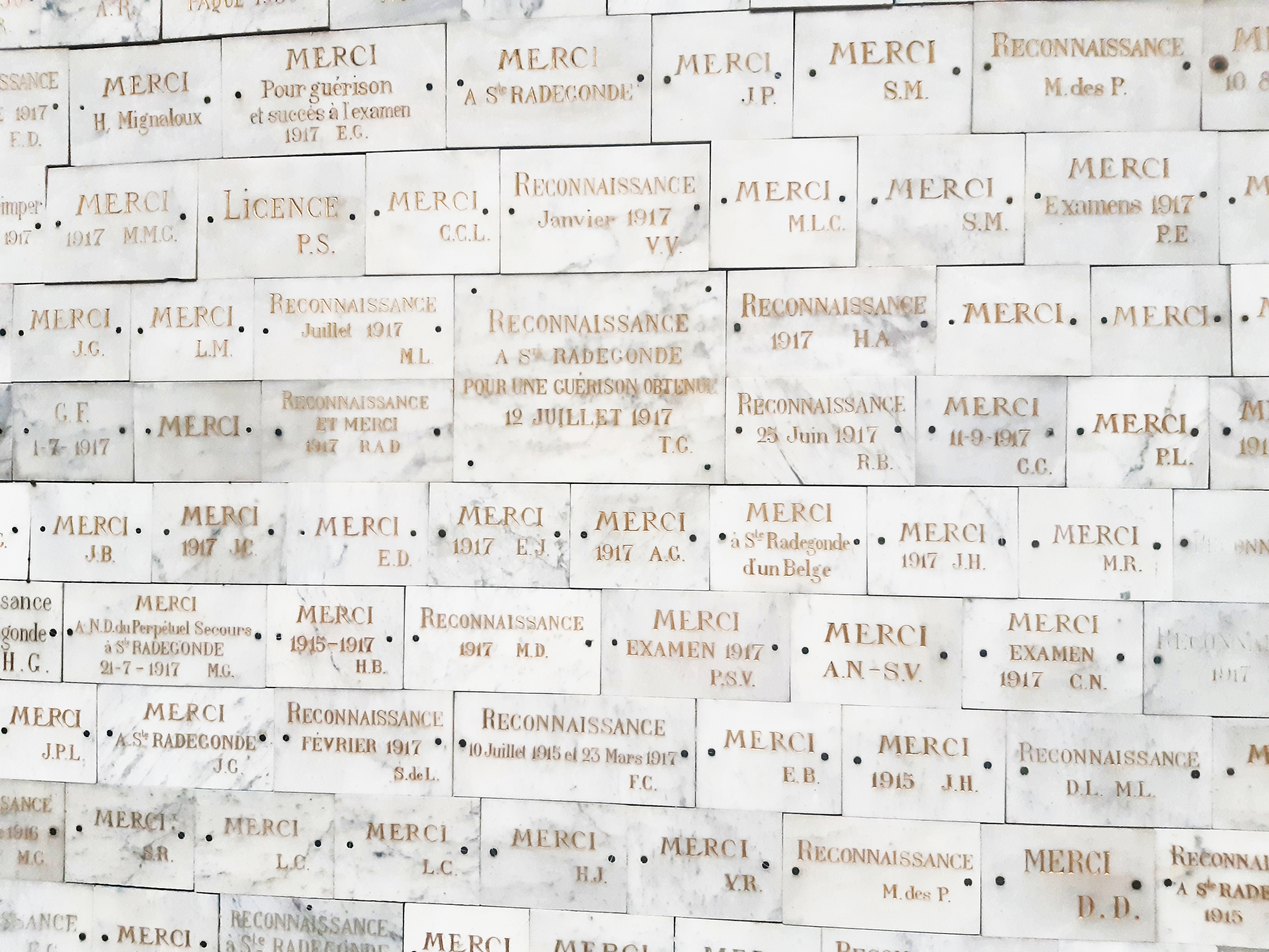 Mur couvert d'ex-votos dans l'église Sainte-Radegonde de Poitiers